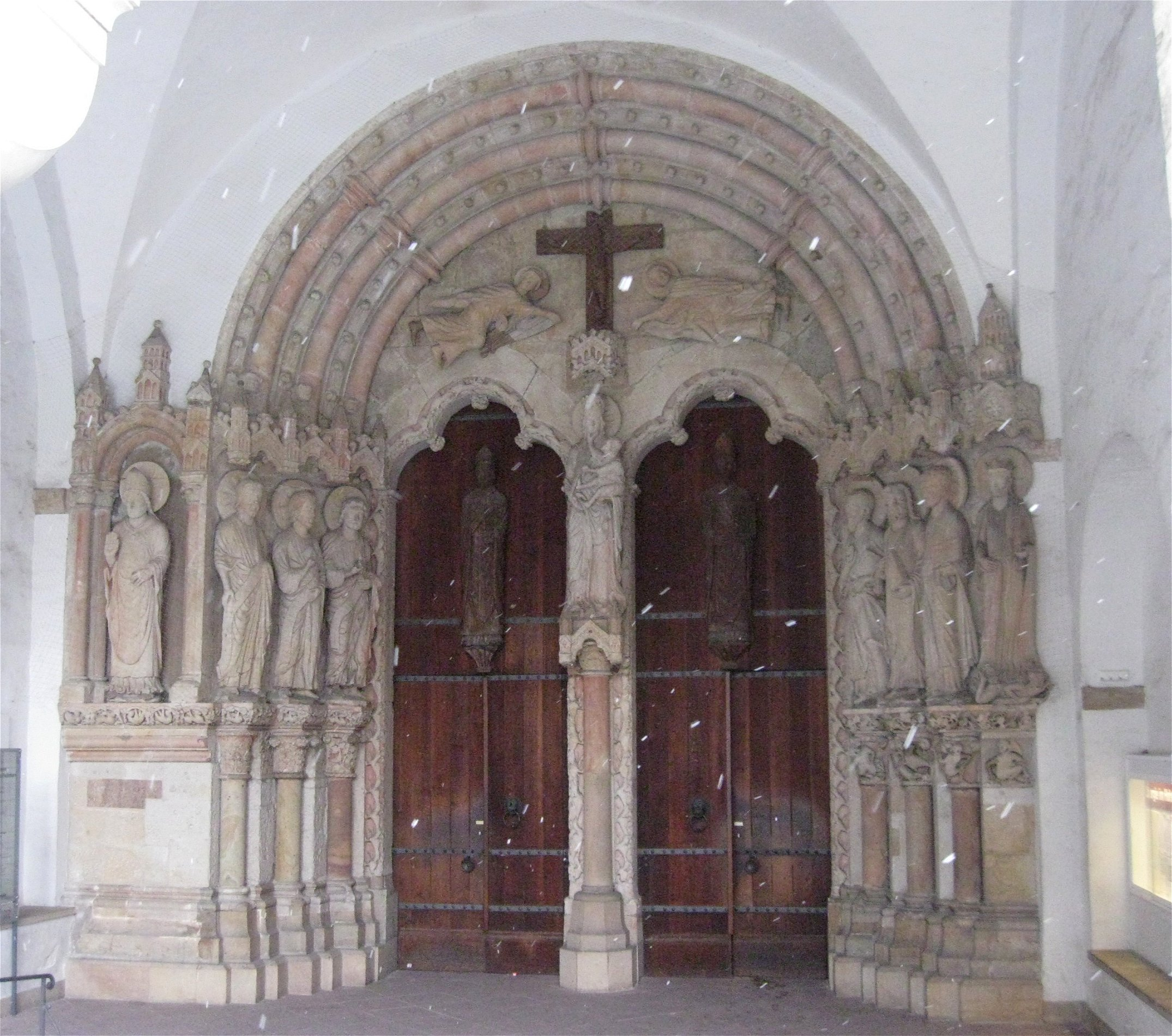 Paradiesportal zum Dom, Paderborn